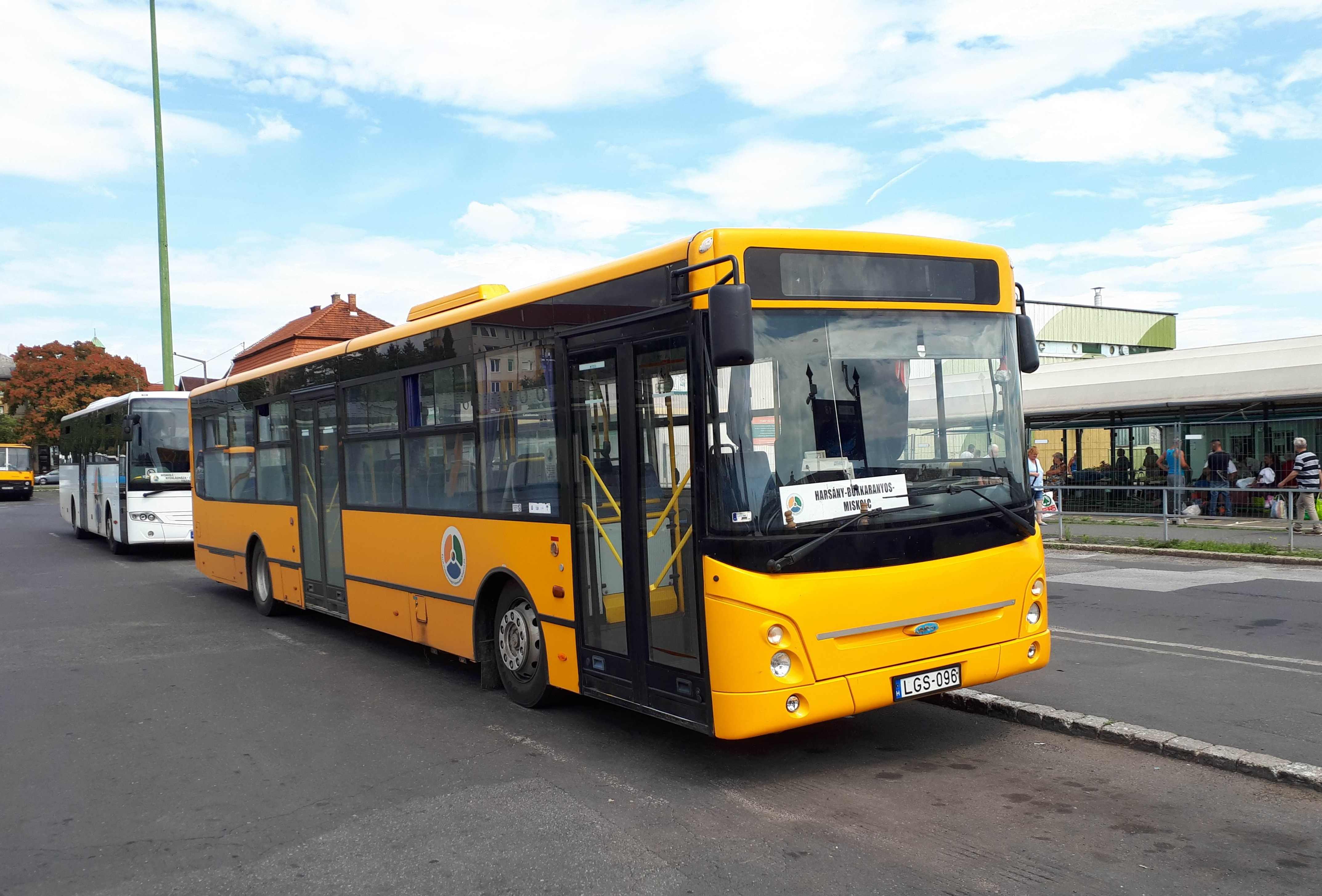 Az ÉMKK LGS-096 rendszámú Ikarus-ARC E127 típusú busza Miskolcon, a 3751-es helyközi járaton.